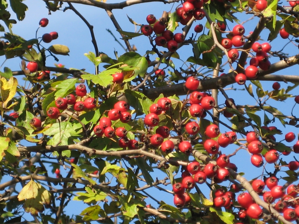 Bijeli glog (Crataegus monogyna), Brinje, Lika, Croatia